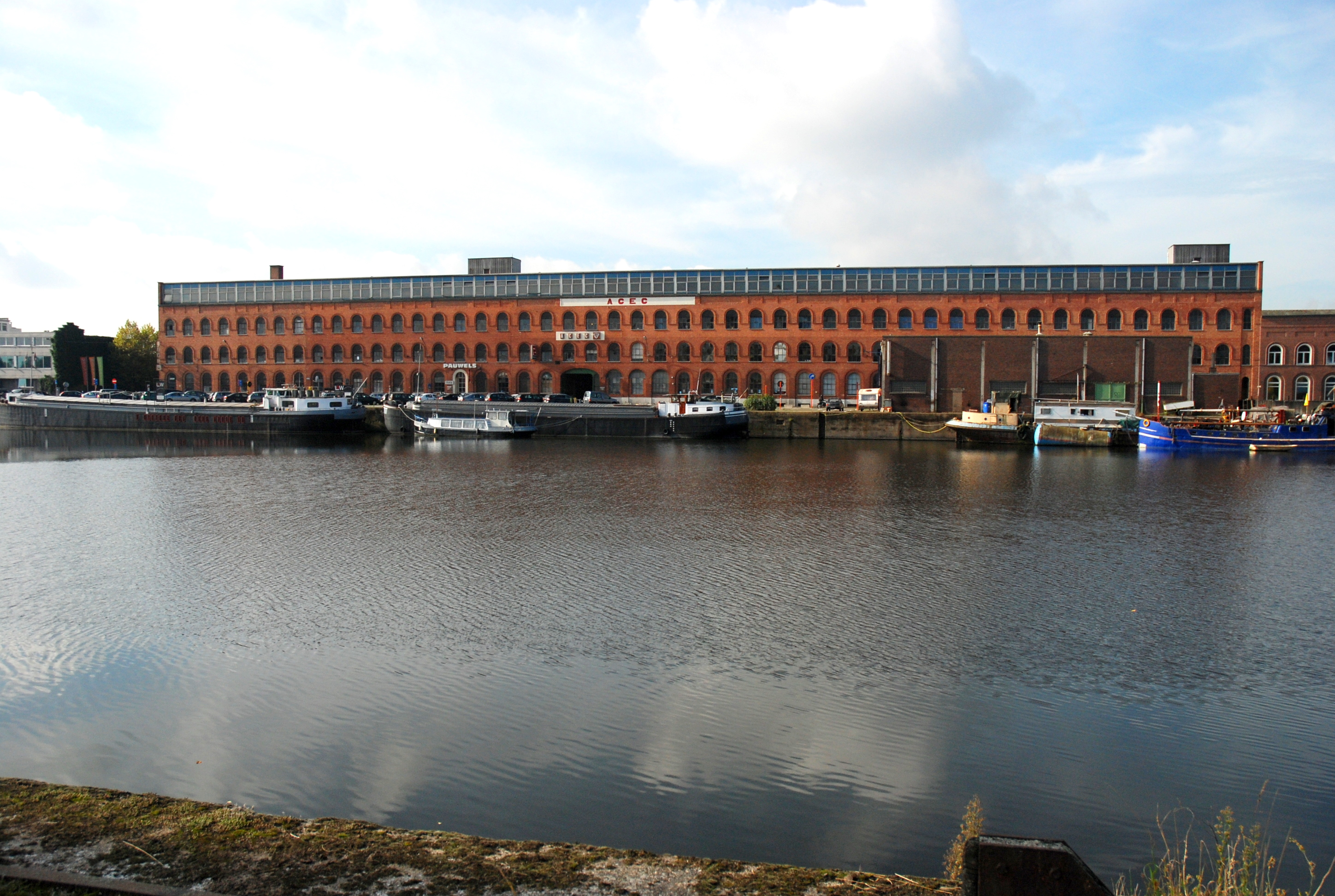 Het Handelsdok in de Gentse voorhaven, met het voormalig gebouw van ACEC, ook Carels - Gent, België